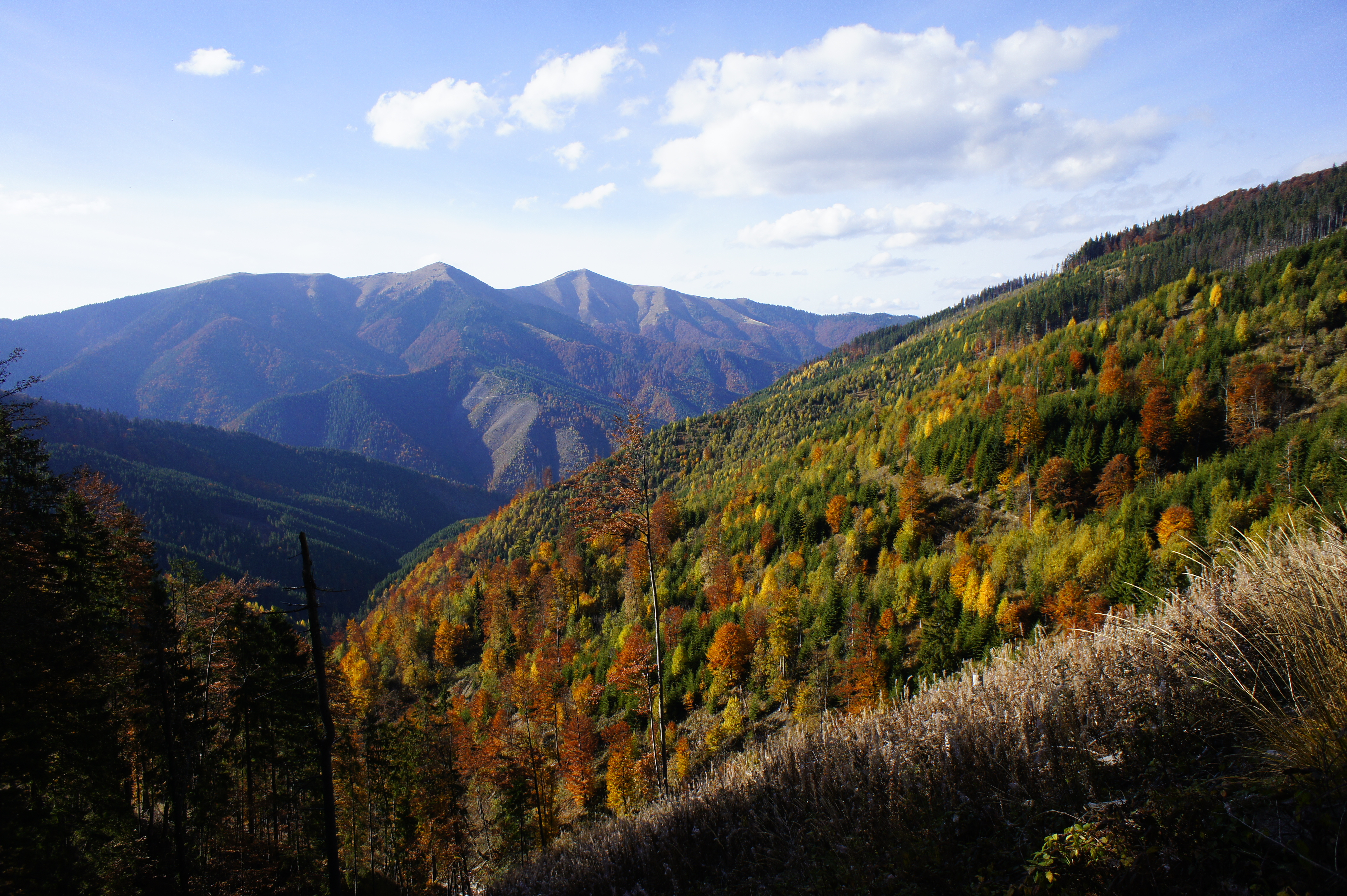 Гора Стримба,- Ґорґани, Карпати, Україна